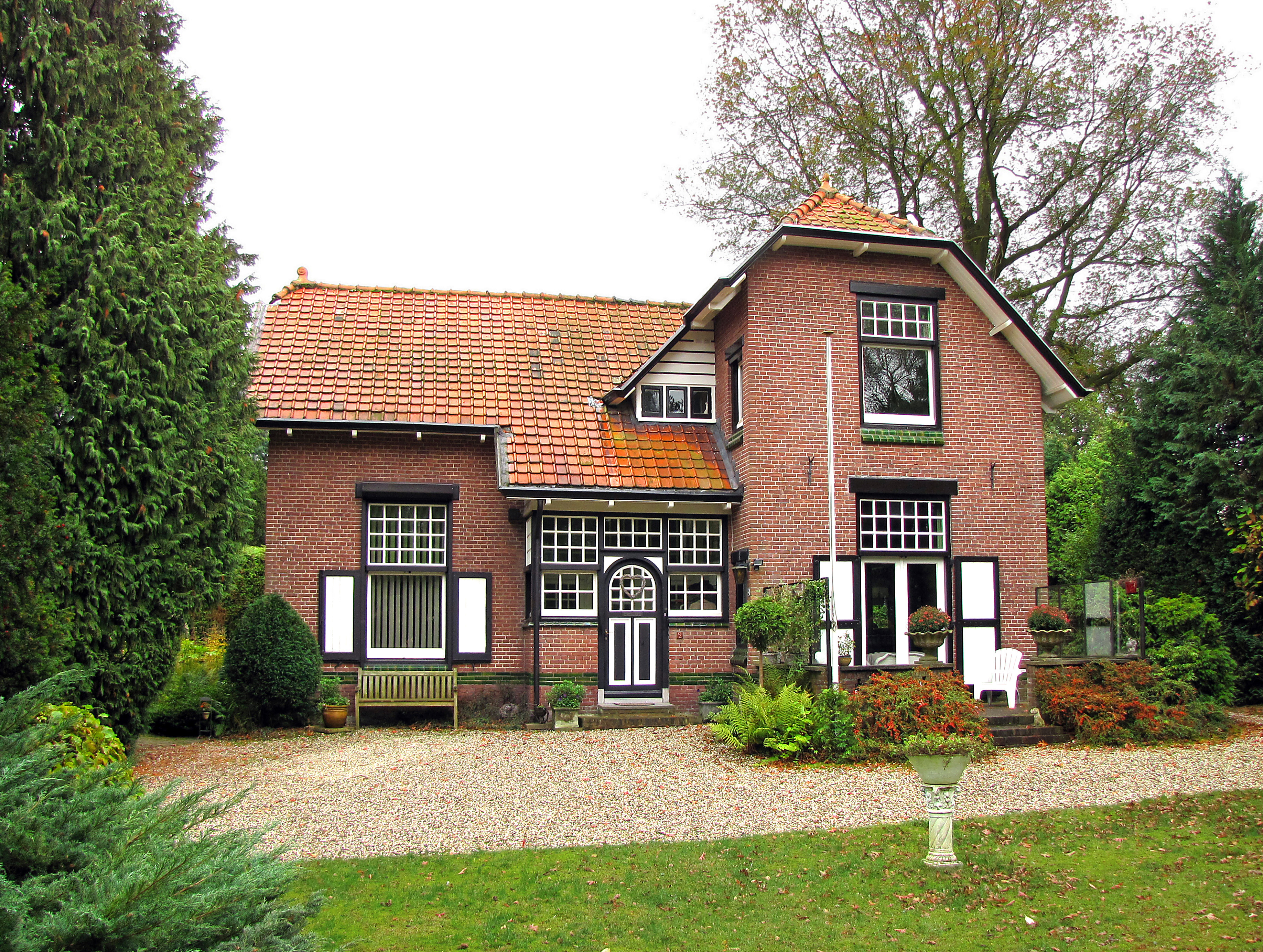 De fraaie villa Julianalaan 2 uit 1906 ontworpen door architecten Jesse & Fontein gefotografeerd vanuit de voortuin met welwillende medewerking van de eigenaren.